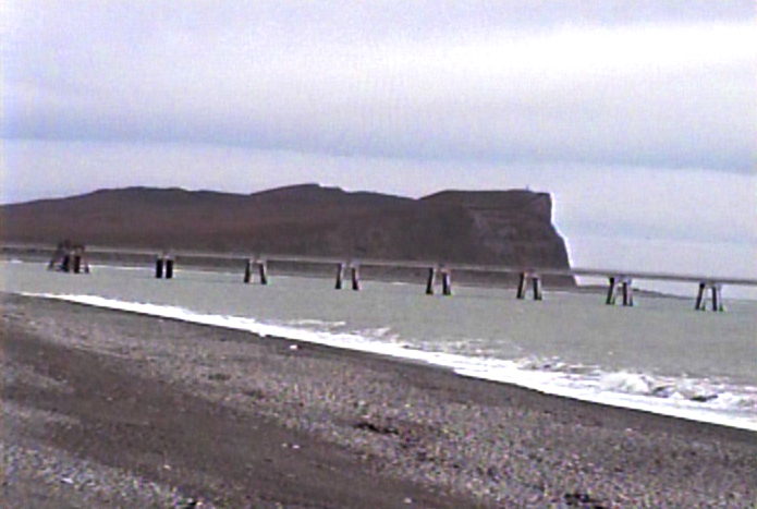 Muelle del Puerto Caleta la Misión, a unos 12 kilómetros al norte de la ciudad de Río Grande, Provincia de Tierra del Fuego, Antártida e Islas del Atlántico Sur, Argentina. Detrás: el cabo Domingo.